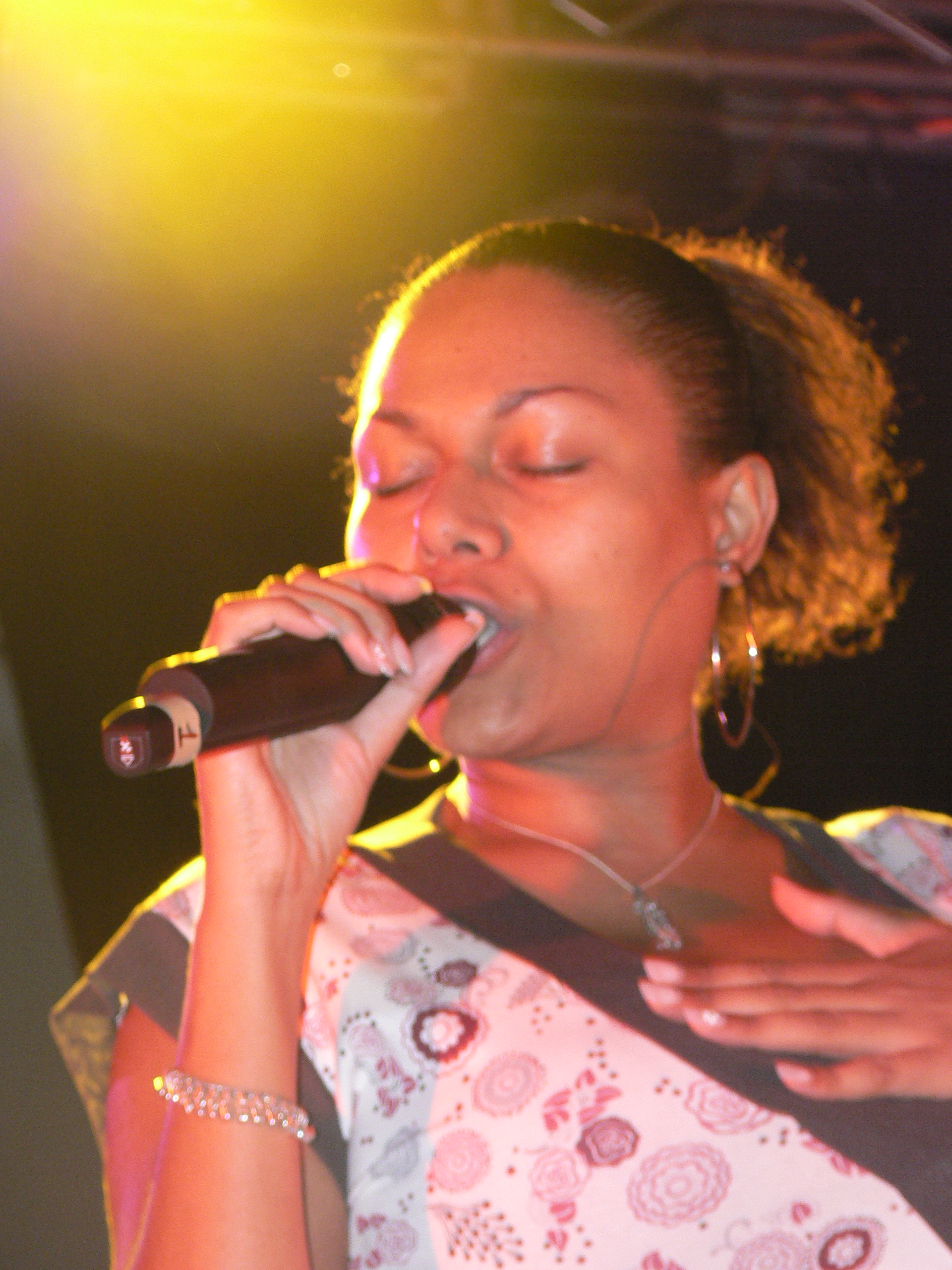 Jenny B in concerto a Monterosso Almo il 29 settembre 2007